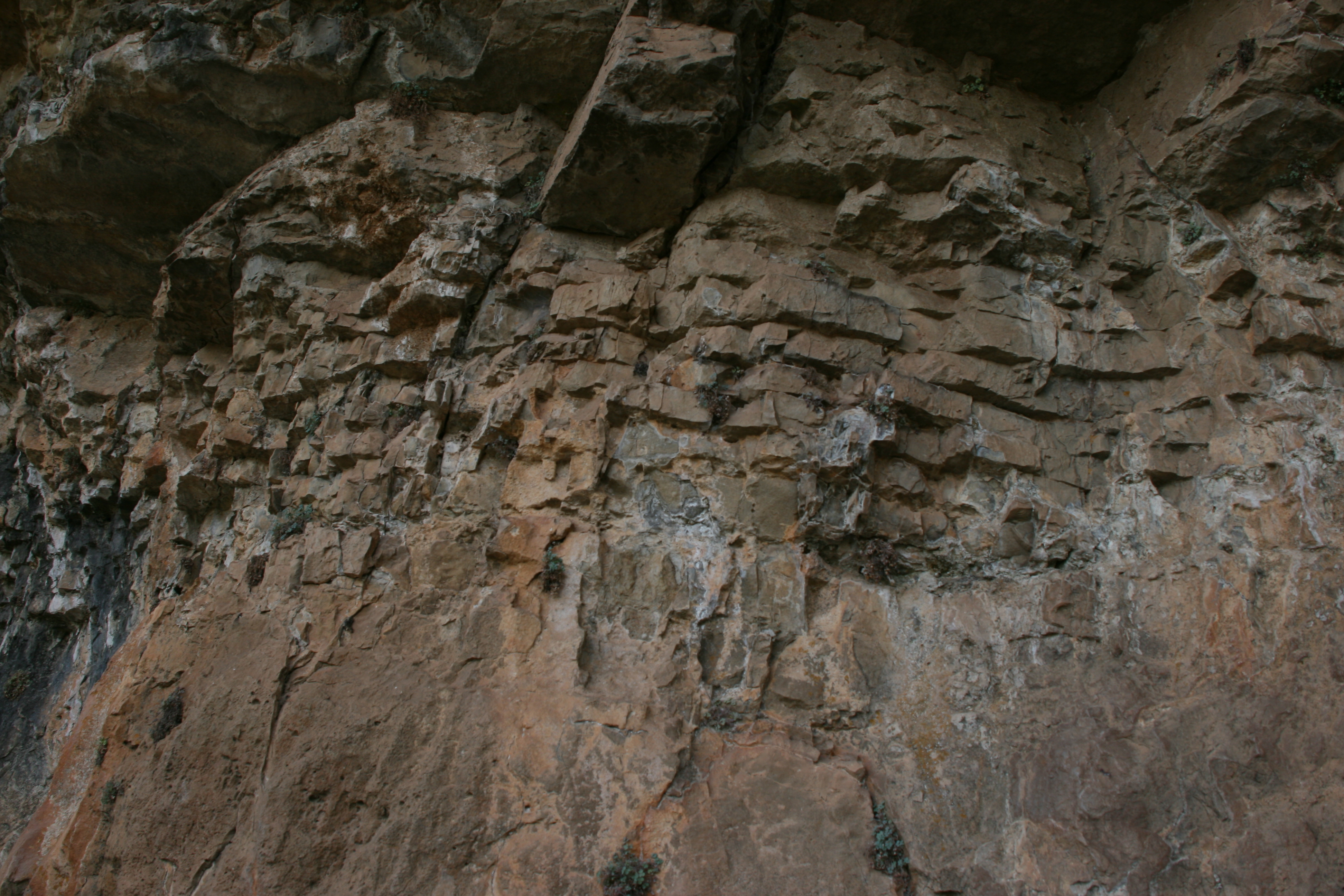 Alrededores de la Cueva de la Hoz en Santa María del Espino, Guadalajara, España.